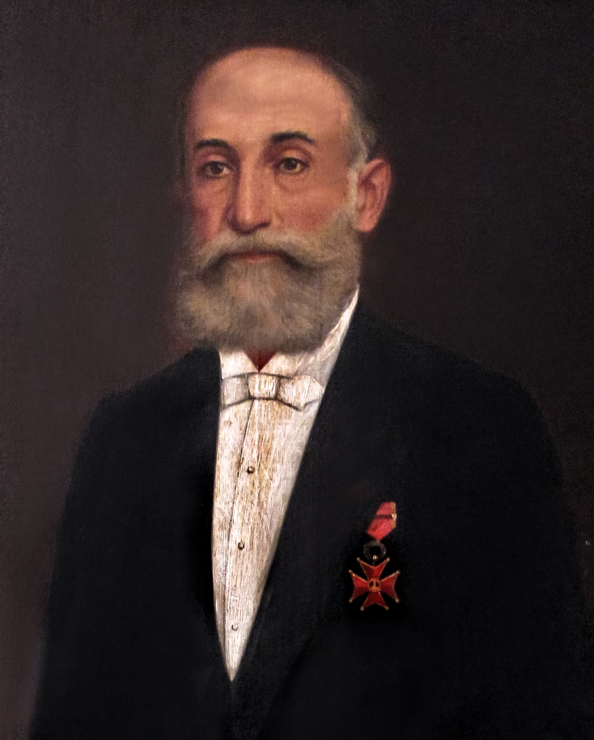 José Francisco da Silva Albano, primeiro e único barão da Aratanha